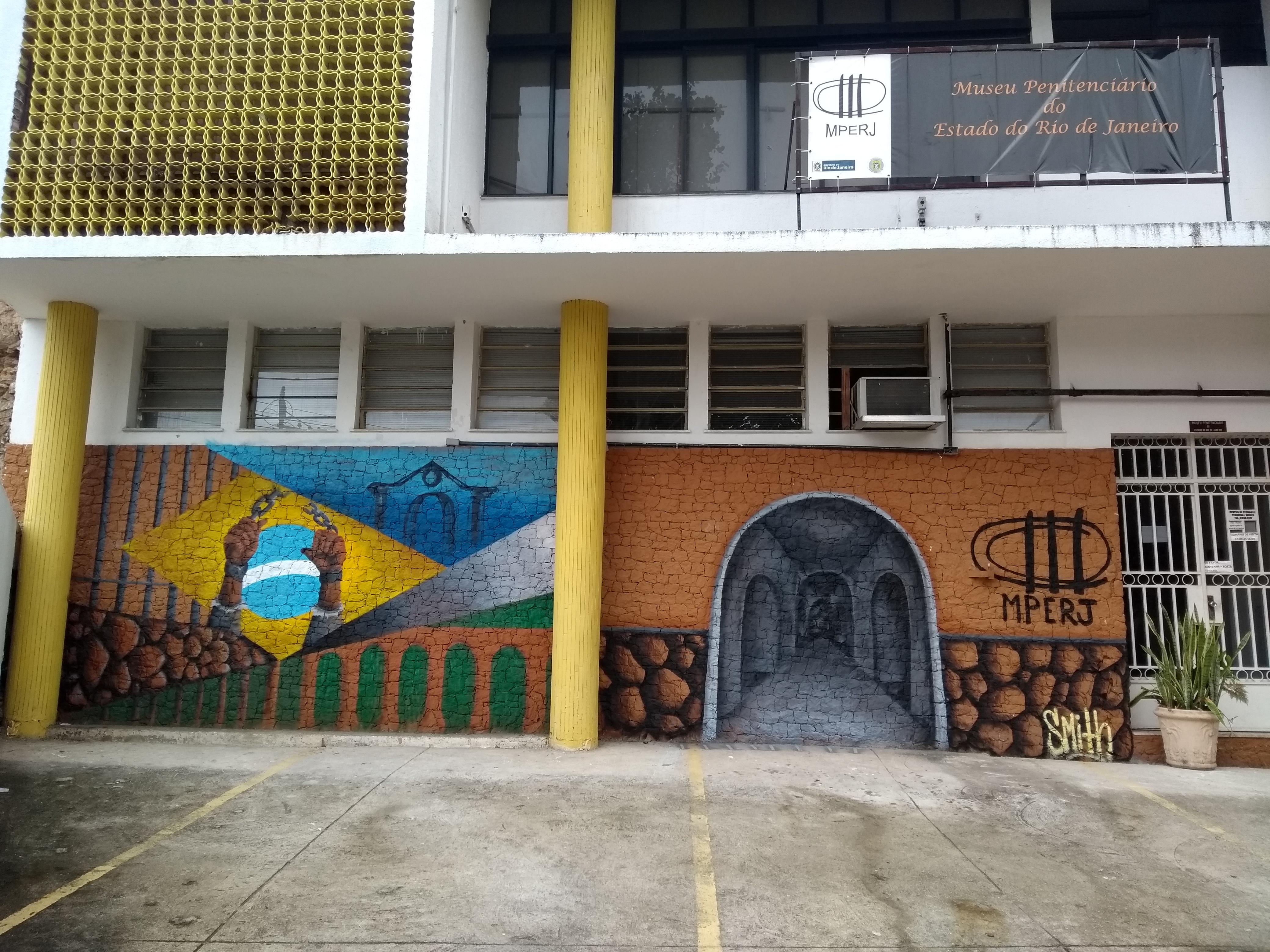 Grafitagem de David Smith na fachada do Museu Penitenciário do Estado do Rio de Janeiro